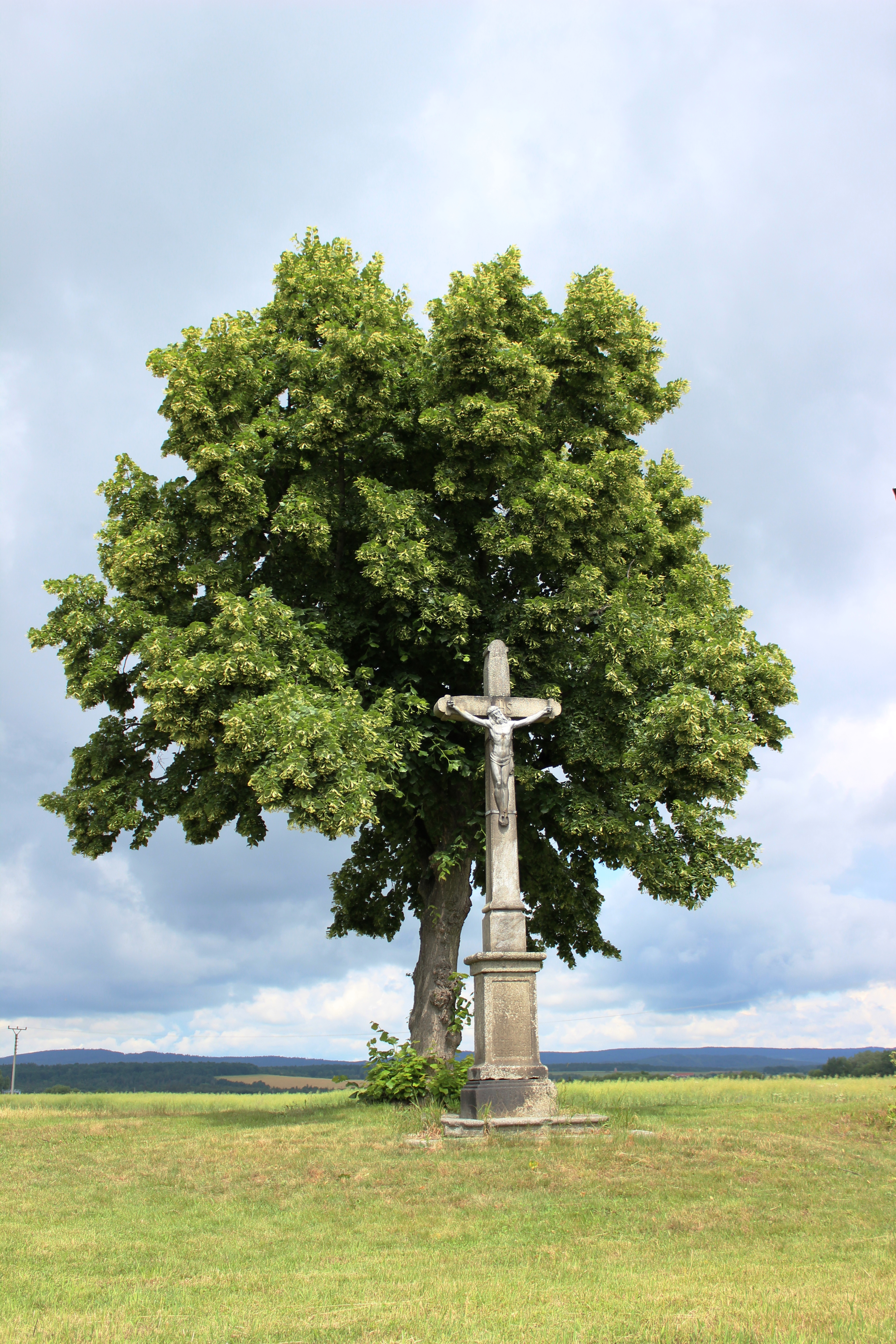 Kříž na okraji vesnice. Svaté Pole. Okres Příbra. Česká republika.